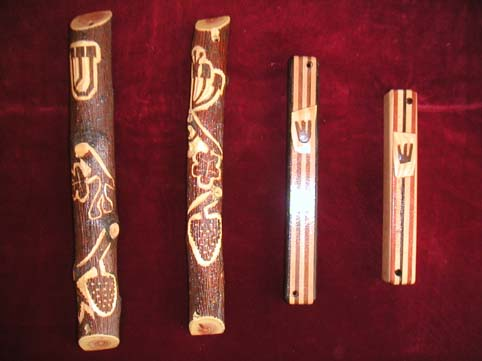 ארבע מזוזות מעץ על כל מזוזה יש האות "שין" שמציינת את שומר דלתות ישראל